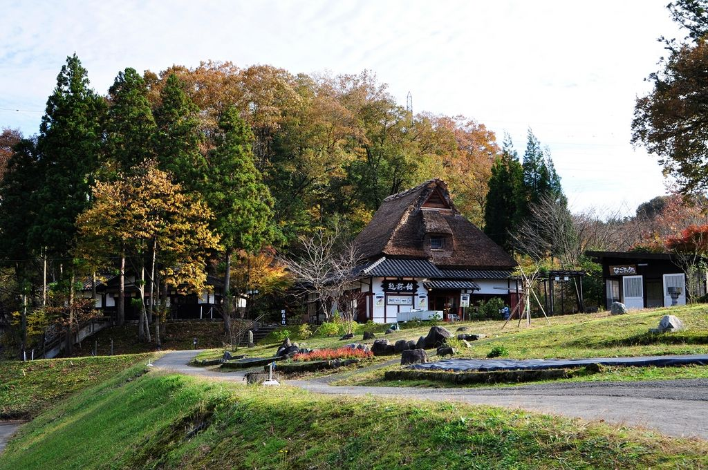 ゆのくにの森・越前の館